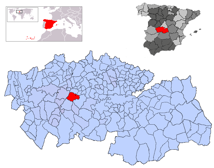 Malpica de Tajo en la provincia de Toledo